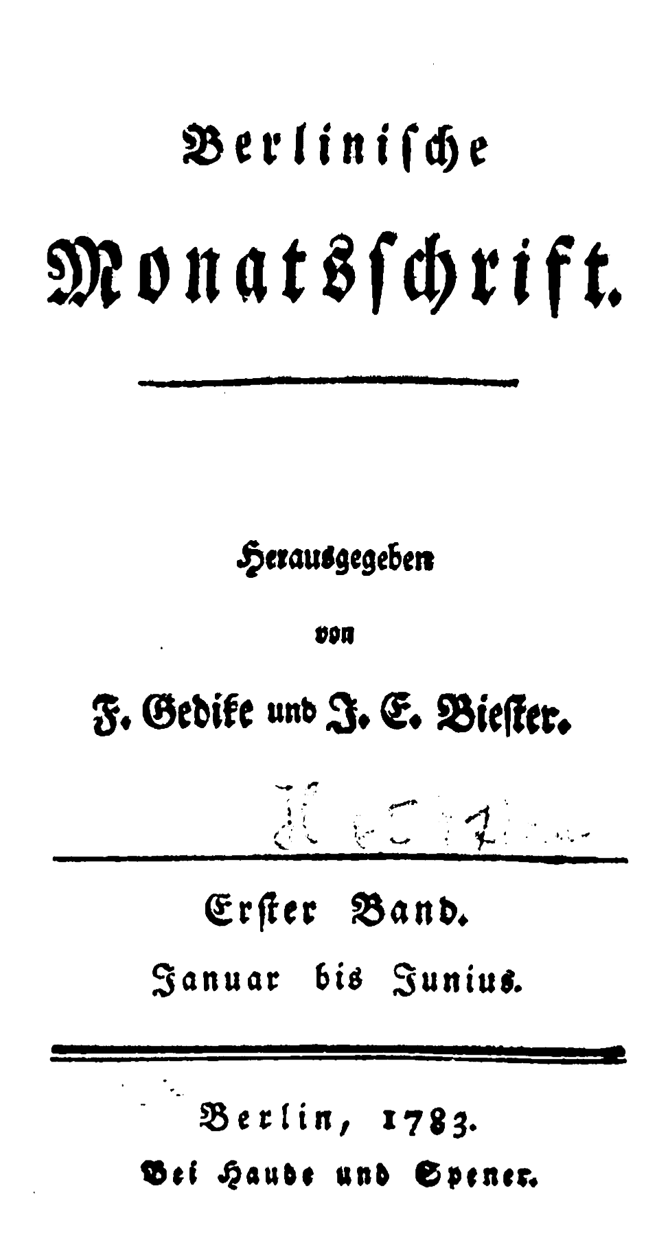 Berlinische Monatsschrift. 1783-1811. Źródło